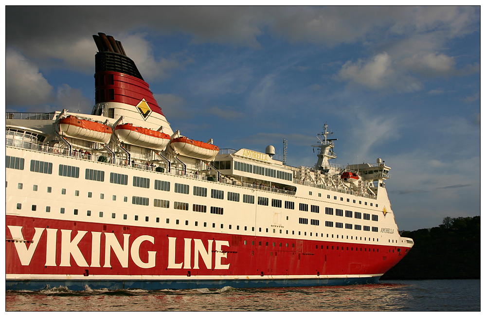 Ferry in Stockholm